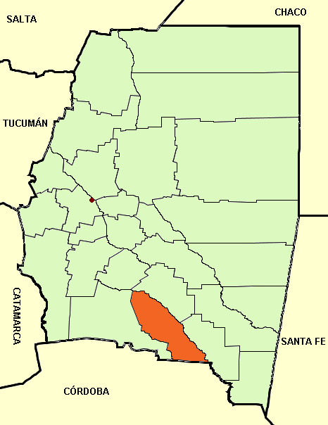 Mapa editado de: Santiago del Estero province (Argentina), departments and capital.png